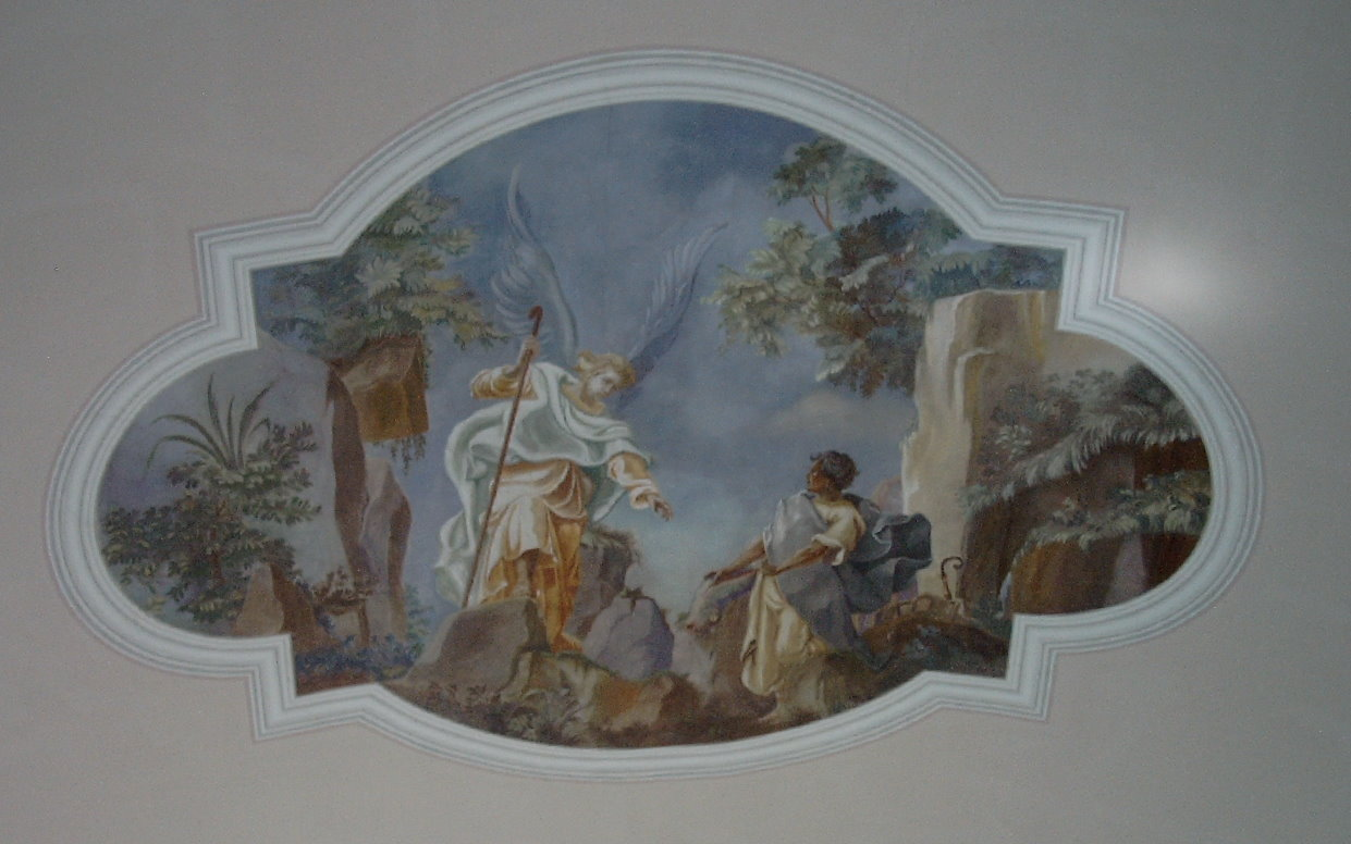 Michaelsberg Kapelle Deckengemälde